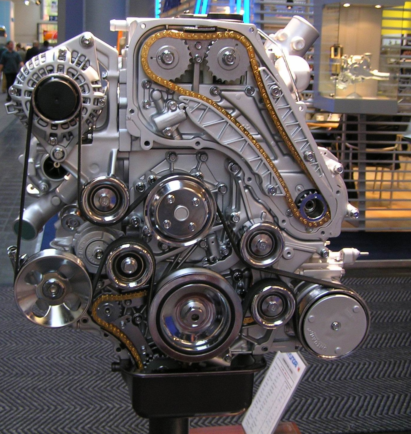 Mecanismul de distribuţie cu lanţuri și arbore cu came montat pe chiulasă, motor Hyundai, Common rail, 2,5cm³